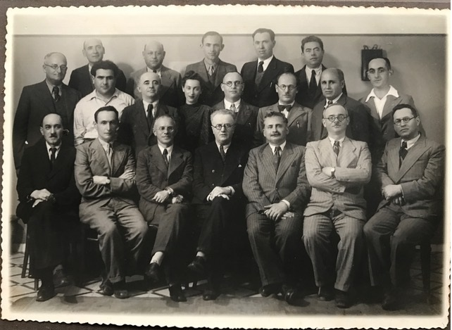 כינוס של וועד השקל העברי יושב רביעי מימין, מרדכי איש-שלום - יו"ר וועד השקל העברי